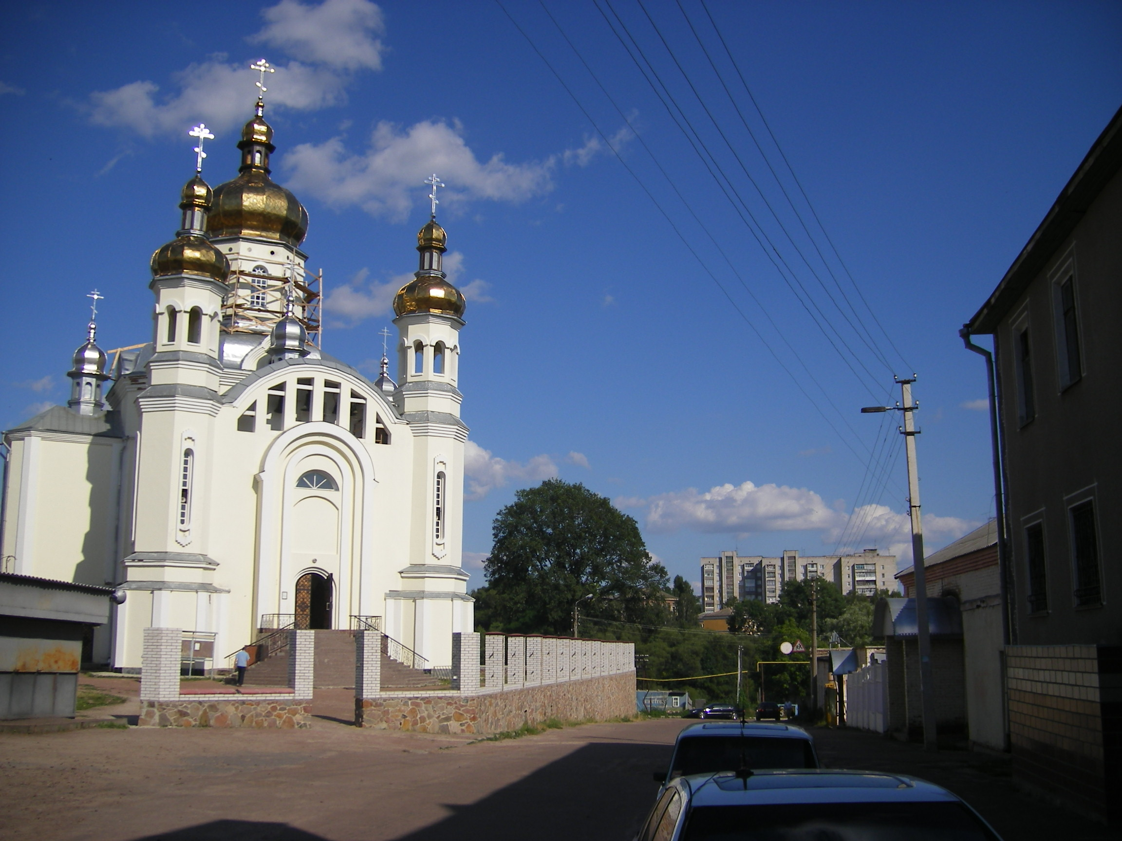 Korosten, Zhytomyr Oblast